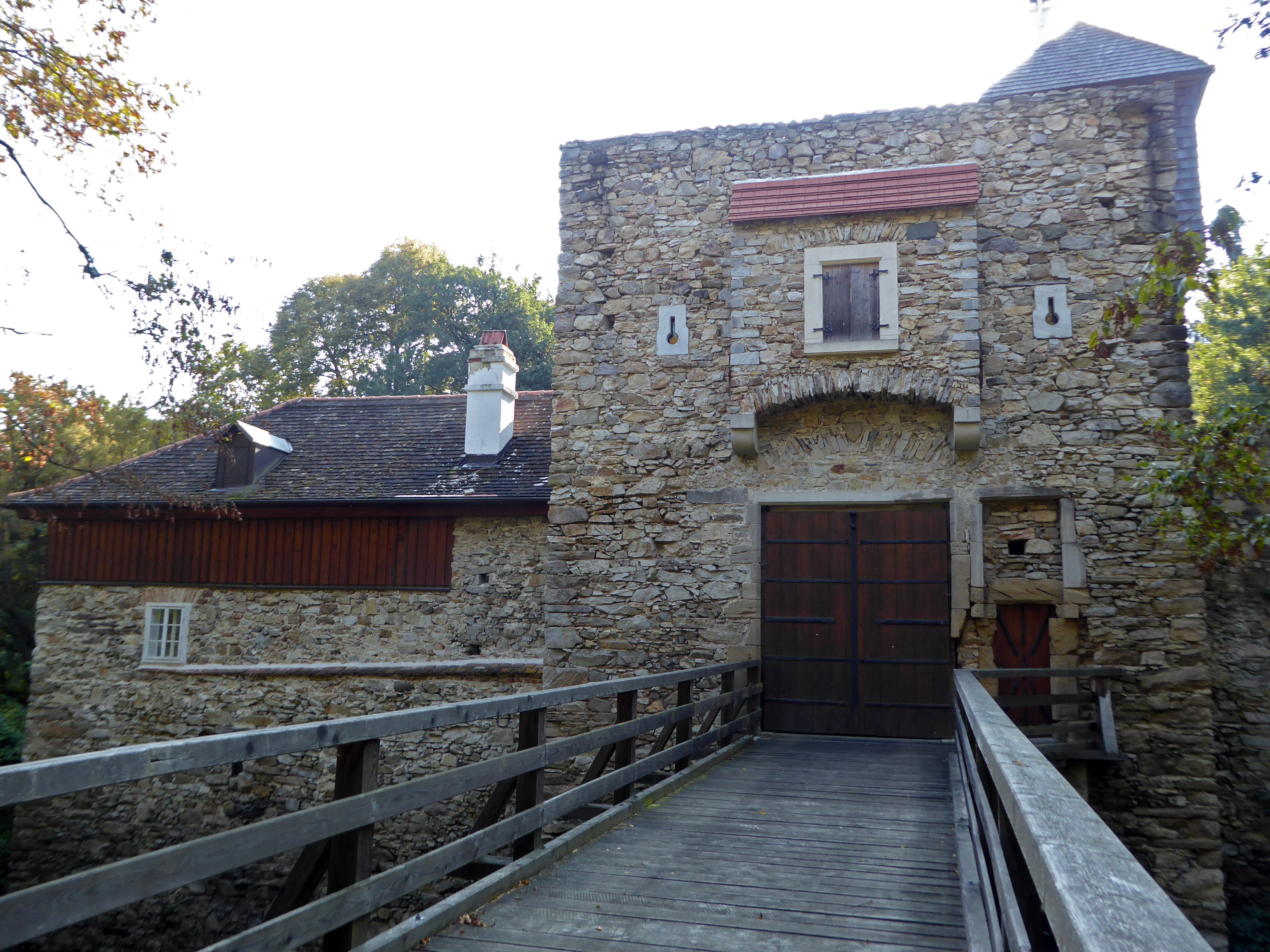 Burgruine Wolfstein, Schönbühel-Aggsbach, Niederösterreich - Zugang